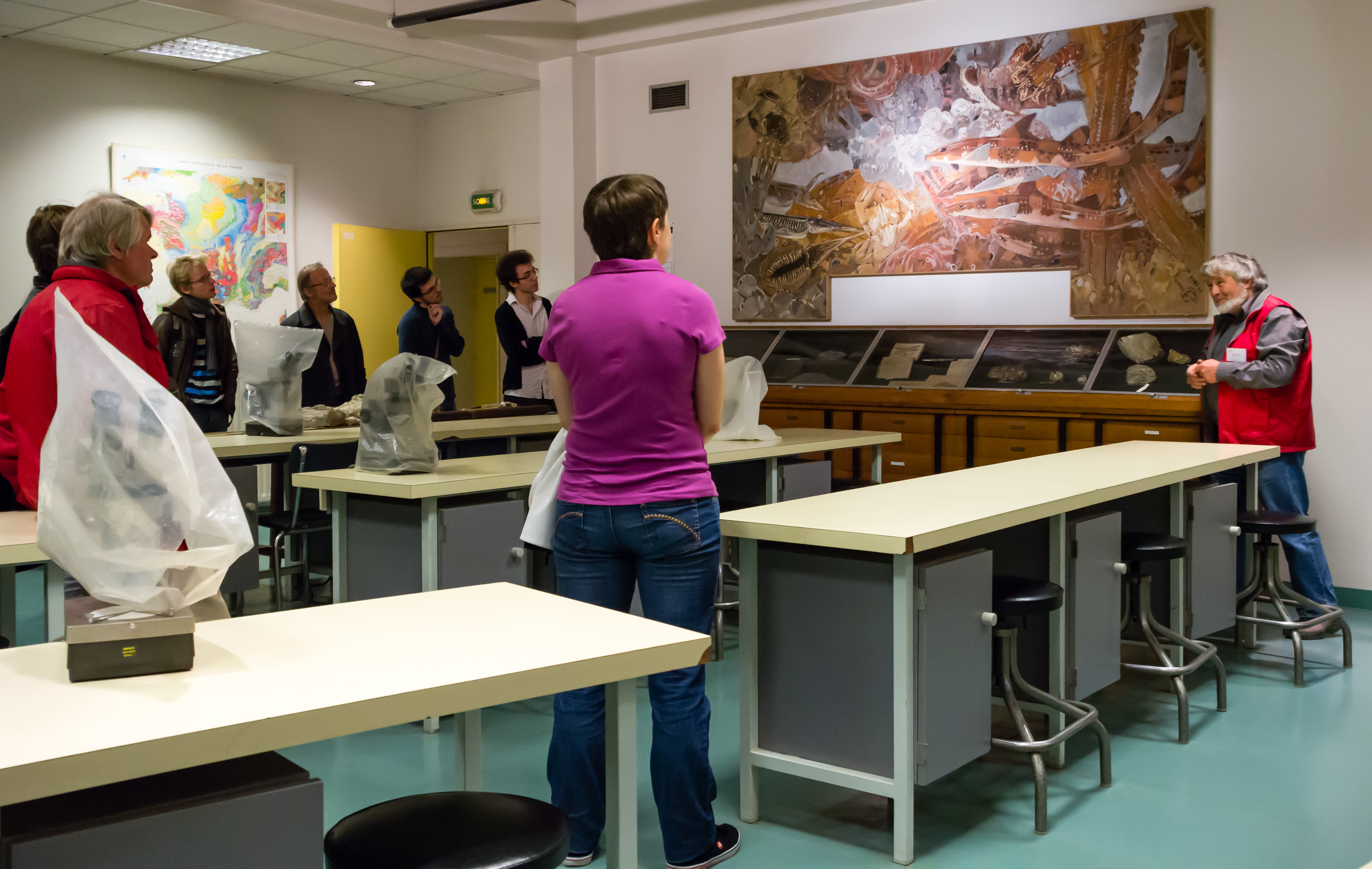 Visite du musée de géologie de l'Université de Rennes 1 lors de la Nuit européenne des musées en 2014.